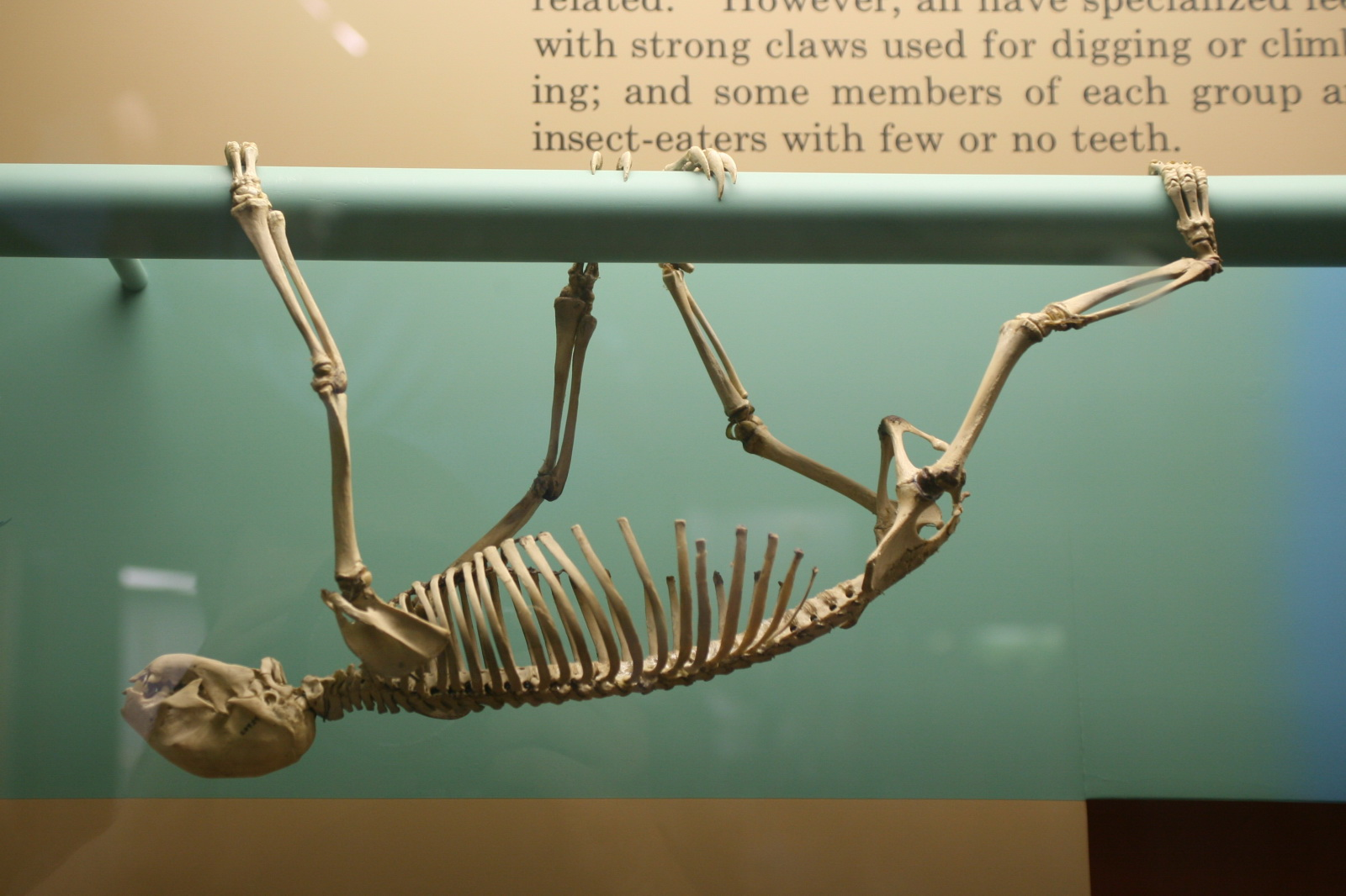 Choloepus hoffmanni skeleton